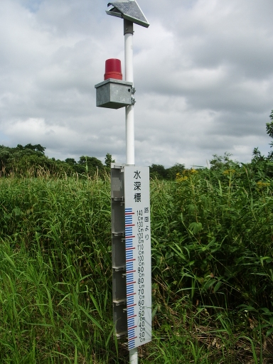 道道732号上猿払浅茅野線の水深標